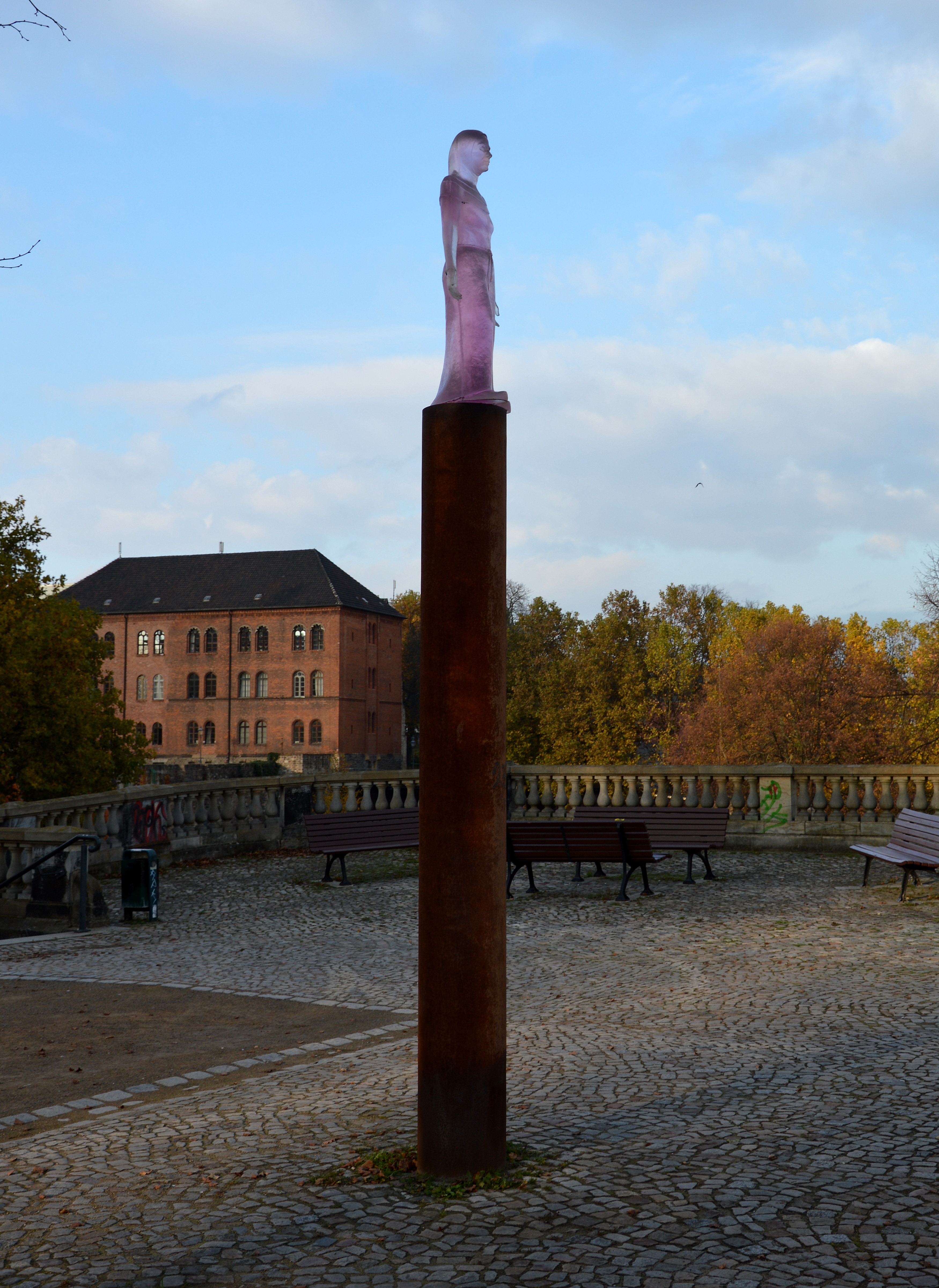 Skulptur Fürstenwall